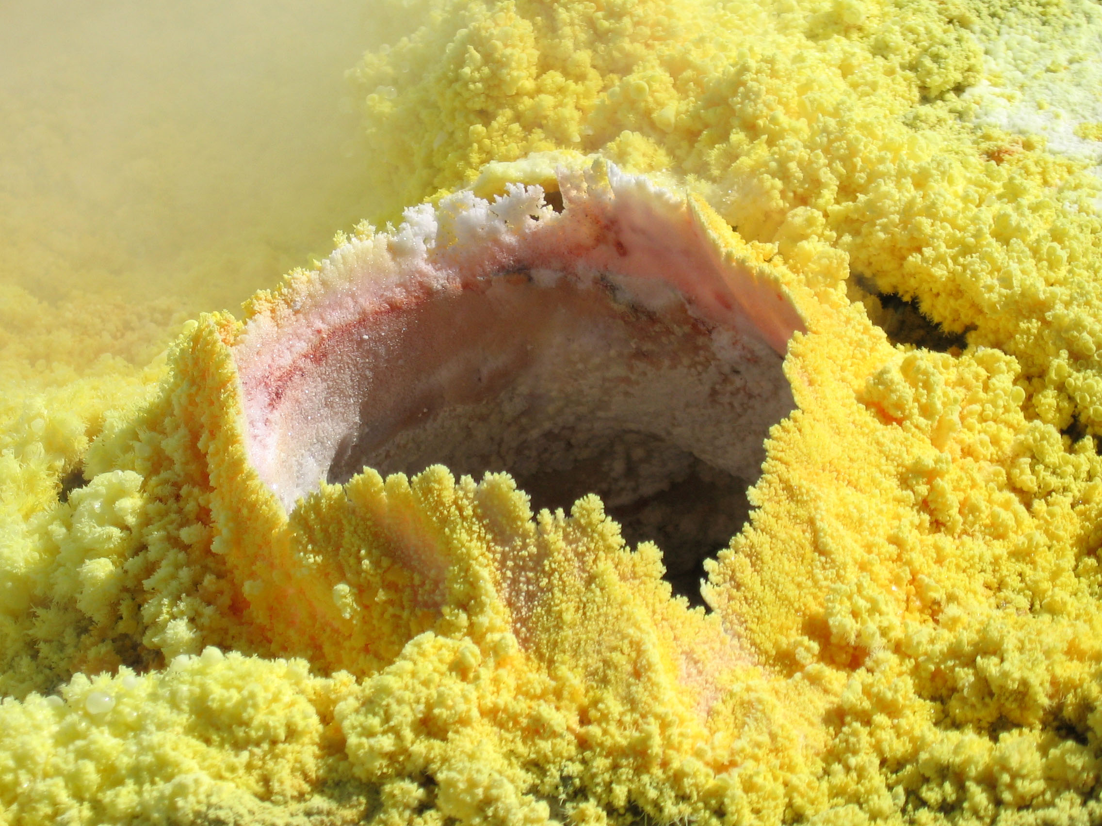 Fumarola